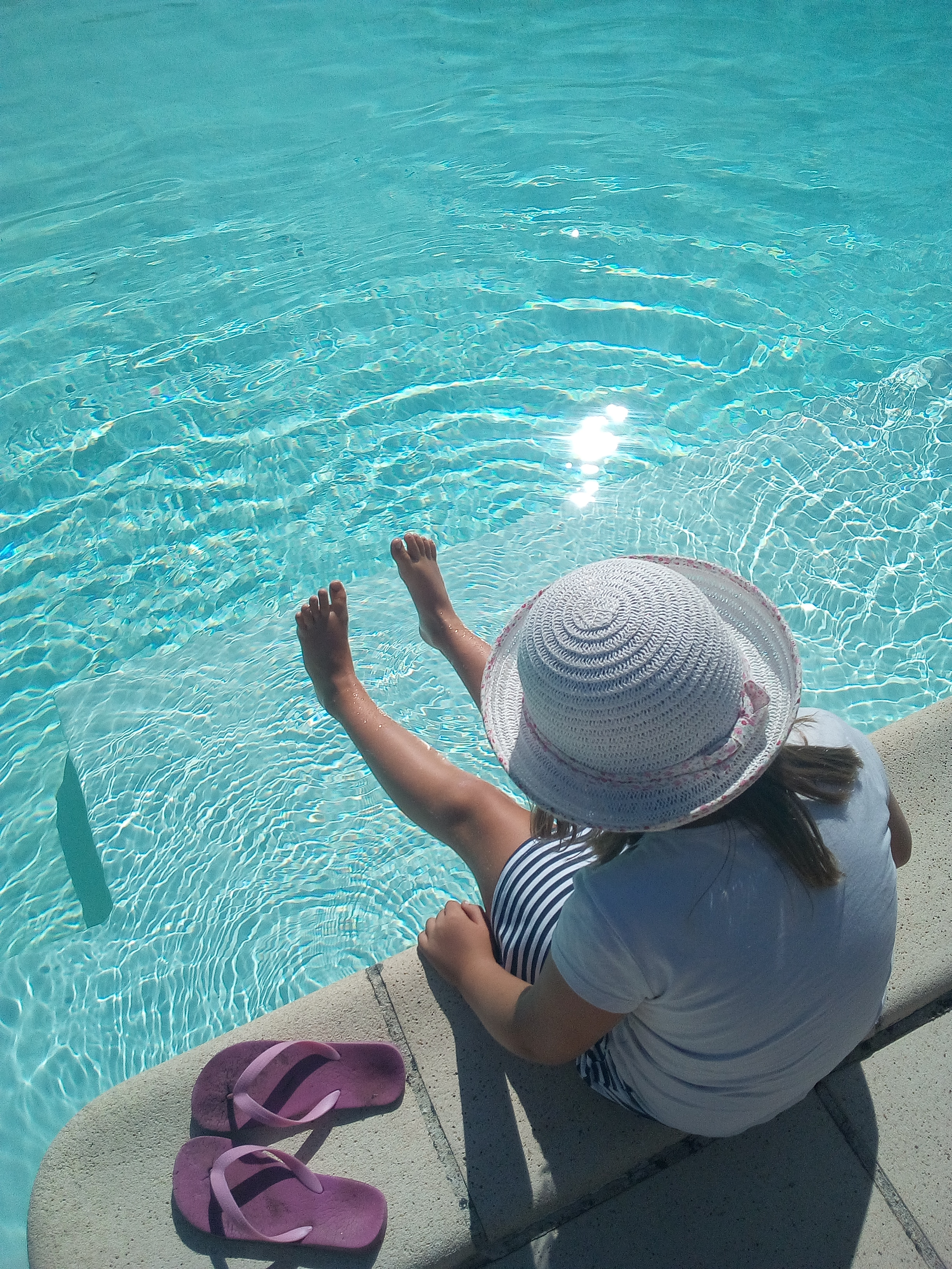 beauté